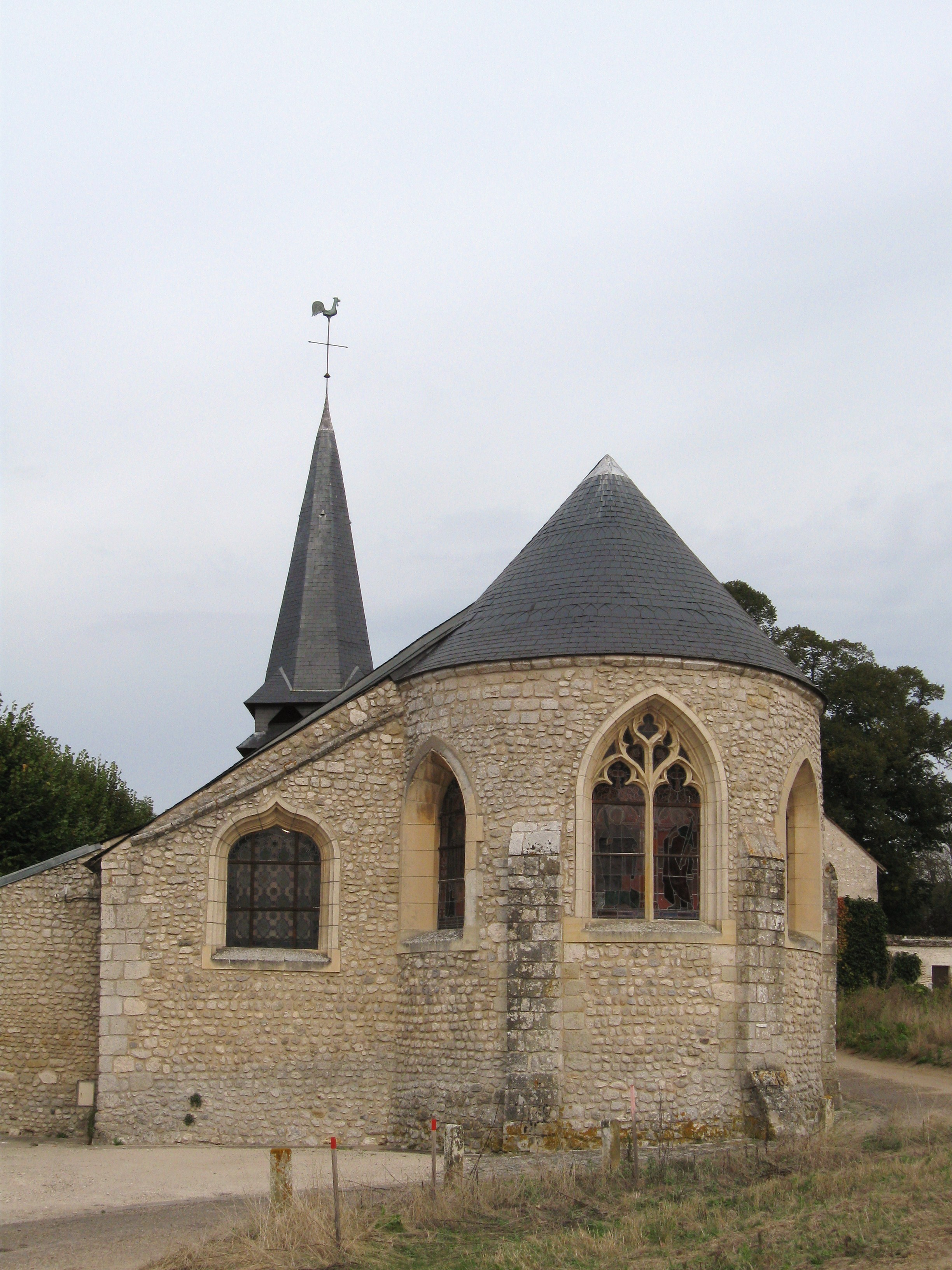 Église Saint-Symphorien, Combleux, Loiret, France